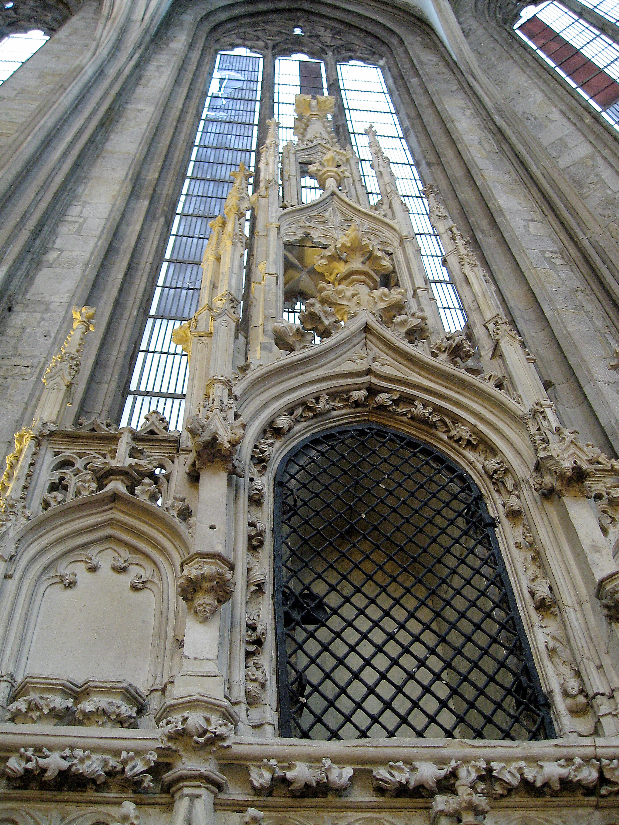 Dortmund, Marienkirche, Sakramentshaus um 1450